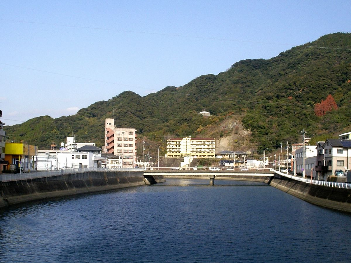 長崎市矢上町・八郎川下流域。橋は矢上橋（国道251号）。